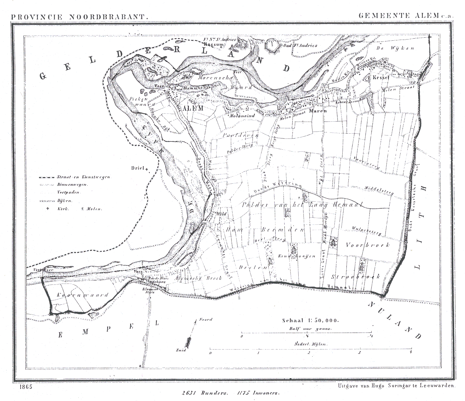 Nederland, Noord-Brabant, Gemeente Alem